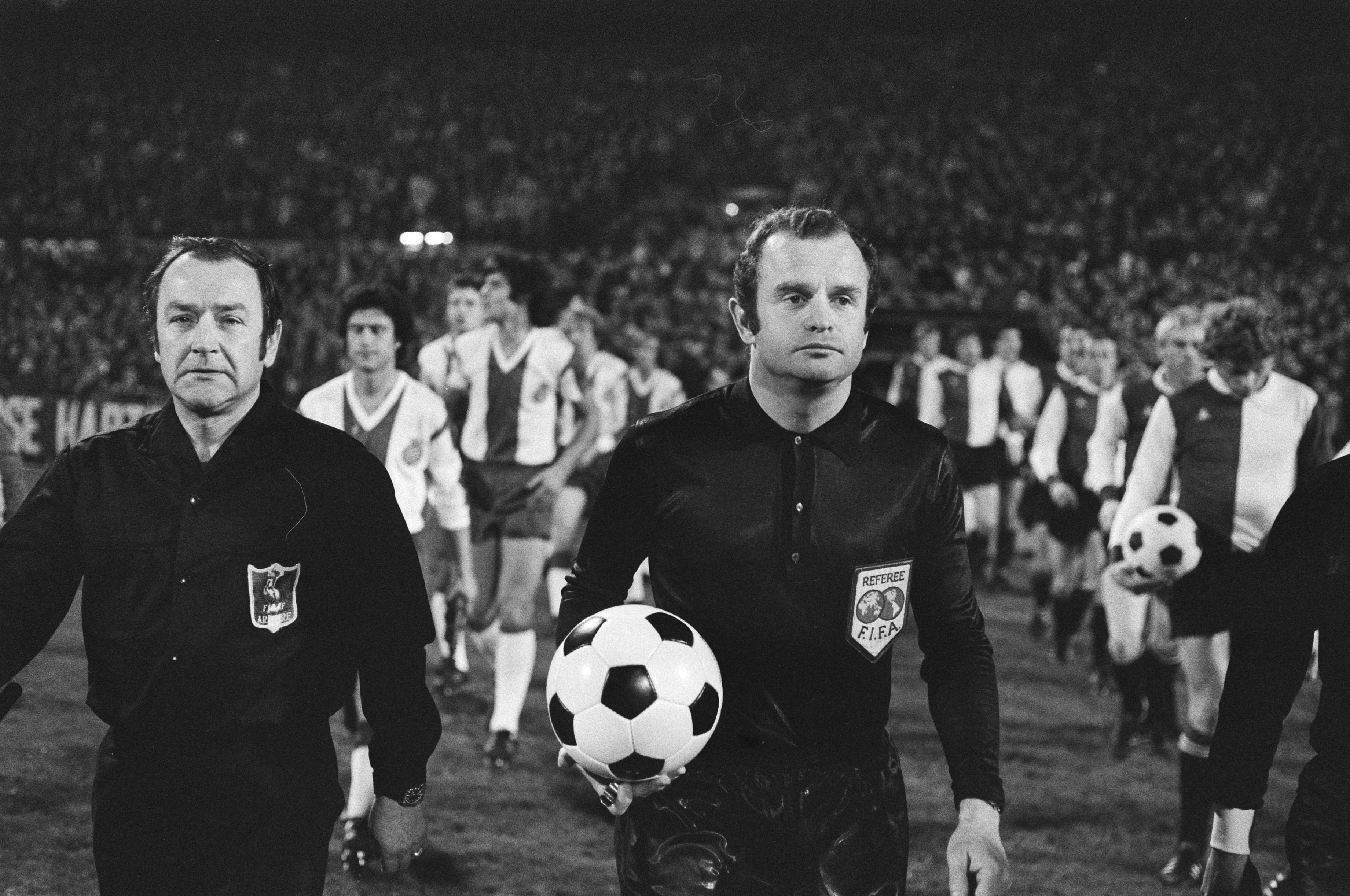 Collectie / Archief : Fotocollectie Anefo Reportage / Serie : [ onbekend ] Beschrijving : Feijenoord tegen Espagnol (Uefa); scheidsrechter Datum : 8 december 1976 Trefwoorden : scheidsrechters, sport, voetbal Instellingsnaam : Feyenoord Fotograaf : Peters, Hans / Anefo Auteursrechthebbende : Nationaal Archief Materiaalsoort : Negatief (zwart/wit) Nummer archiefinventaris : bekijk toegang 2.24.01.05 Bestanddeelnummer : 928-9273